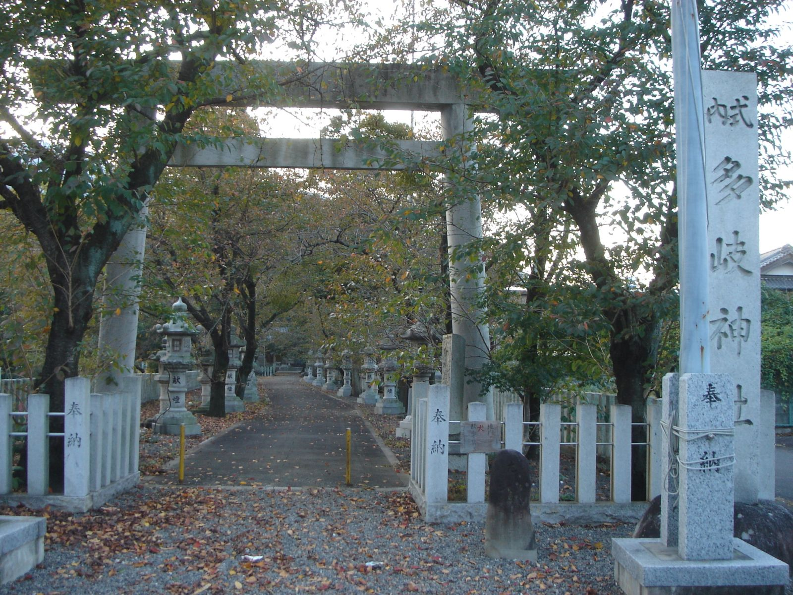 Tagi Jinja(Shrine)(多岐神社),Yoro,Gifu,Japan(岐阜県養老町)で撮影